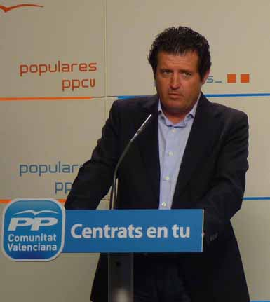 José Císcar (Moraira, 1961) a una roda de premsa a la seu del Partit Popular a València.